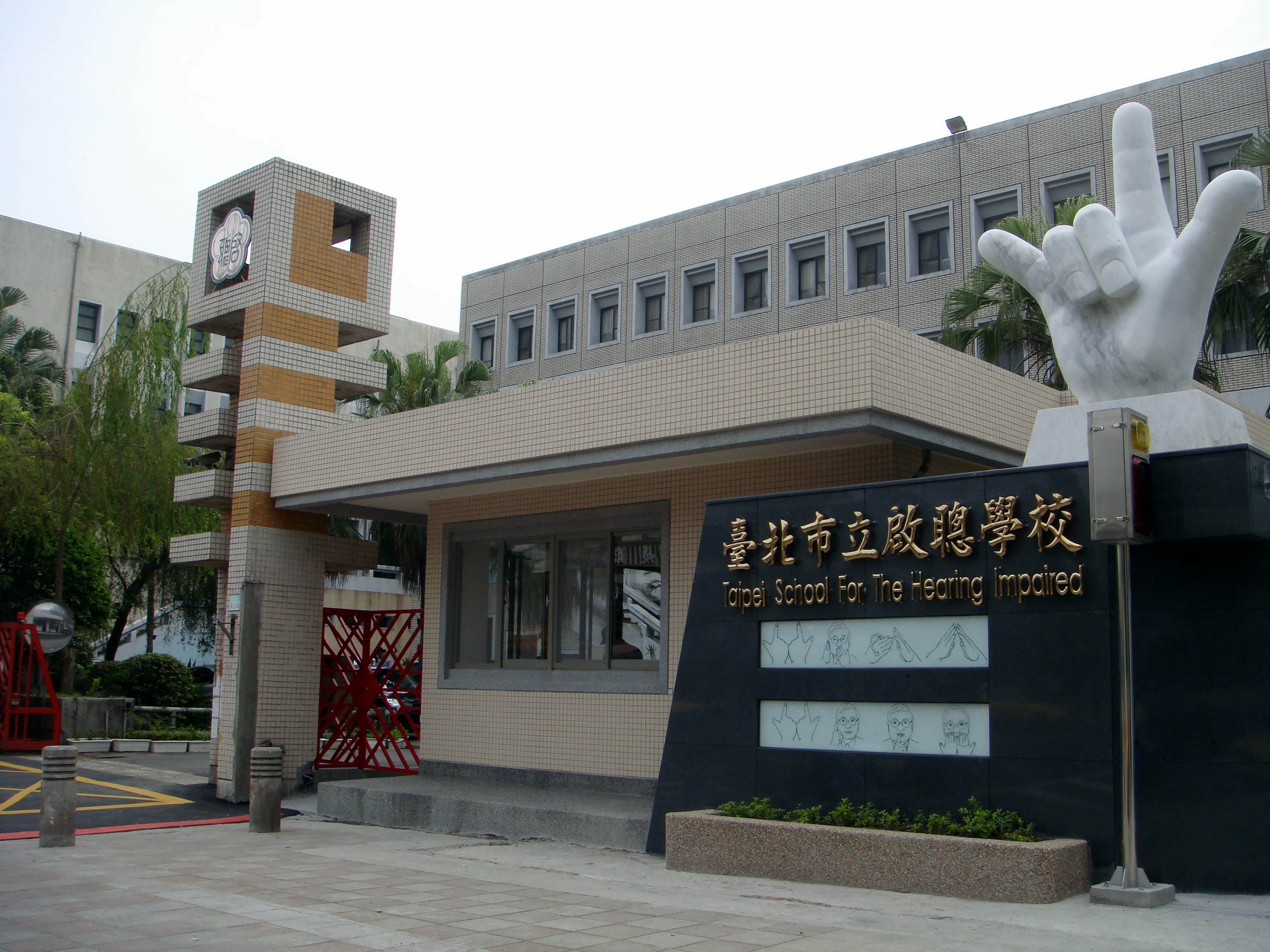 中文（台灣）: 臺北市立啟聰學校大門。